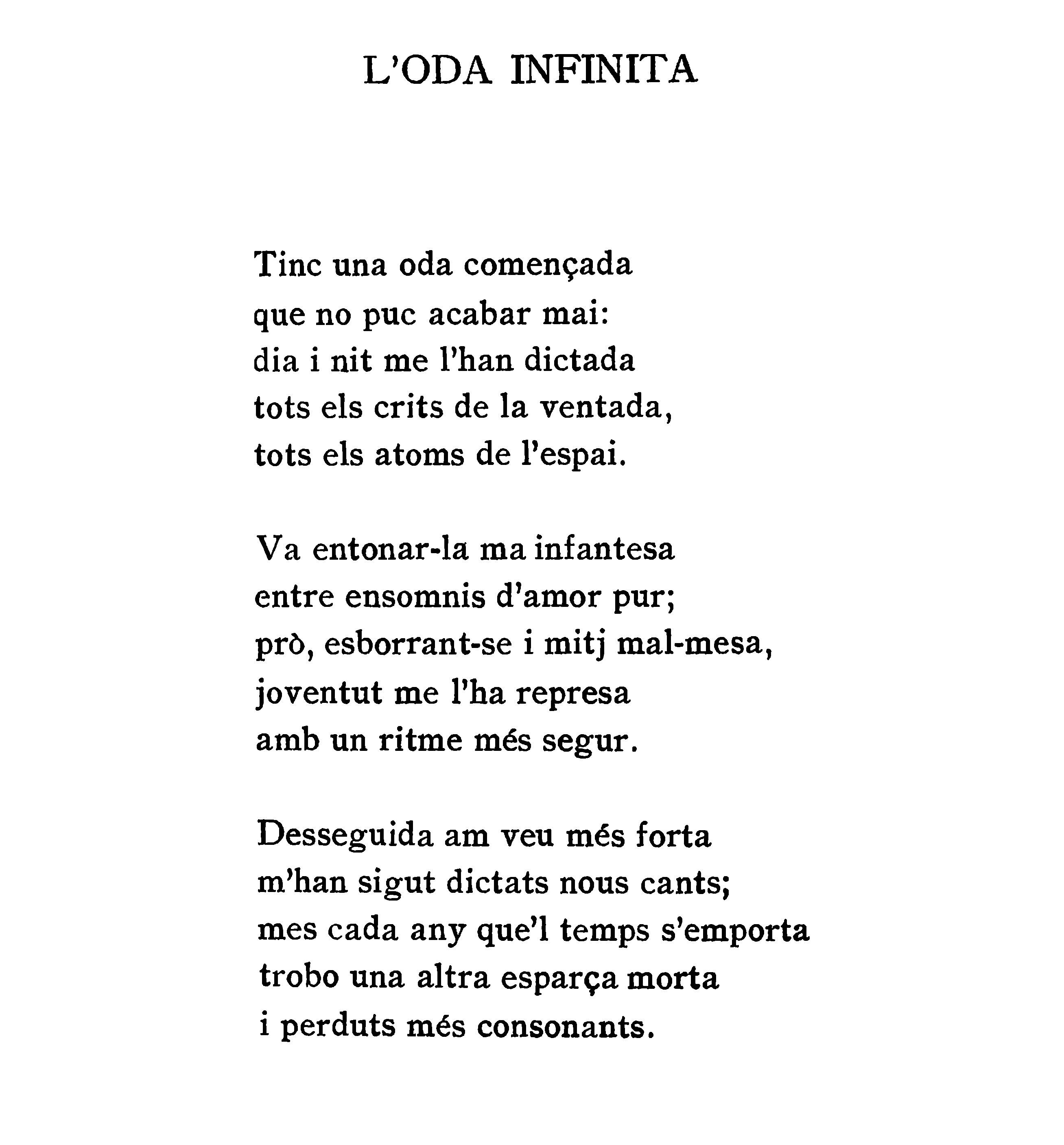 Joan Maragall. Obres completes d'En Joan Maragall - Poesies I (1912). Barcelona.